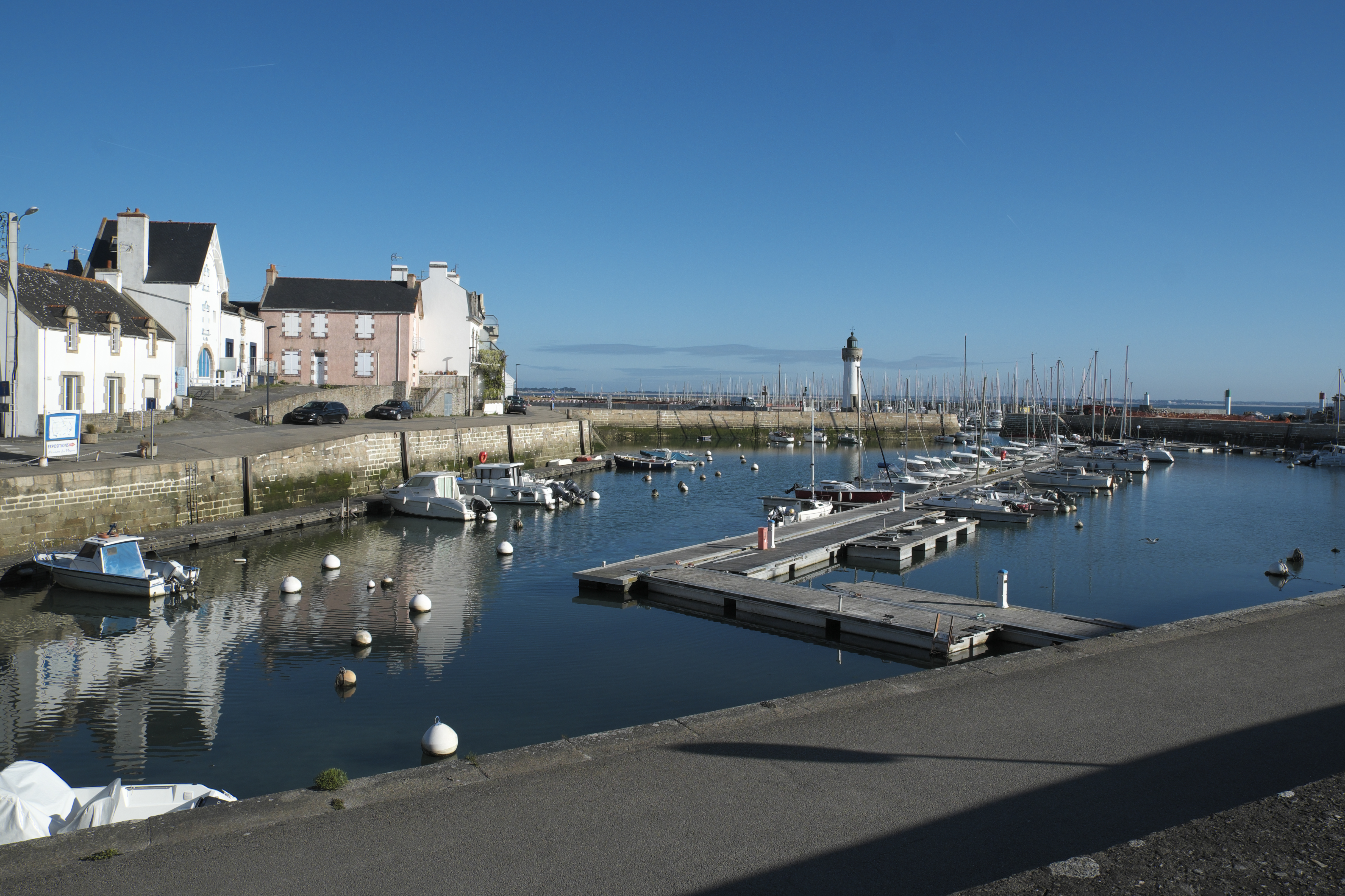 Port-Haliguen in Quiberon im Département Morbihan (Region Bretagne/Frankreich)